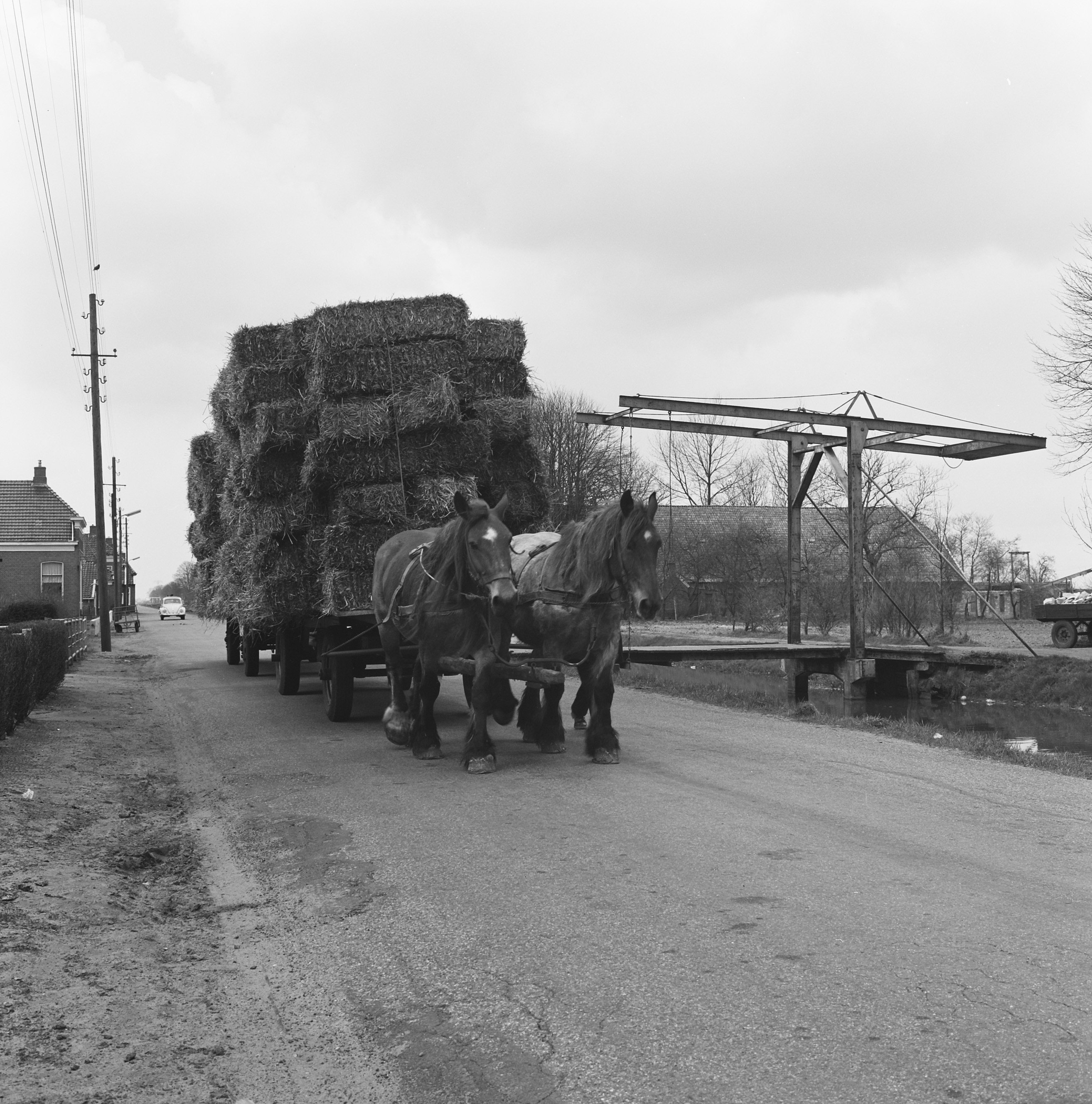 Collectie / Archief : Fotocollectie Nederlandse Heidemaatschappij Reportage / Serie : [ onbekend ] Beschrijving : paarden, wagens, stro, ophaalbruggen, Groningen Datum : 1968 Locatie : Groningen, Zuidwending Trefwoorden : ophaalbruggen, paarden, stro, wagens Fotograaf : Fotograaf Onbekend / Heidemij Auteursrechthebbende : Nationaal Archief Materiaalsoort : Negatief (zwart/wit) Nummer archiefinventaris : bekijk toegang 2.24.06.02 Bestanddeelnummer : 168-0421